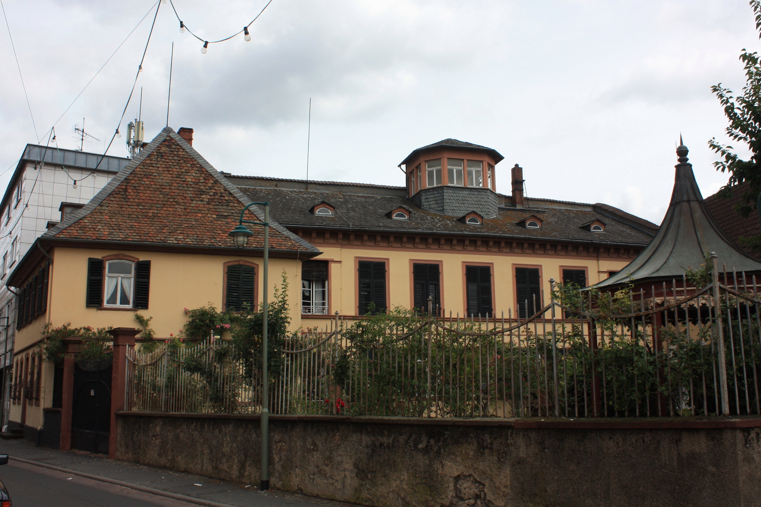 Hochheim, Hessen: Ehemaliger Antoniter Klosterhofes und Amtsrezeptur